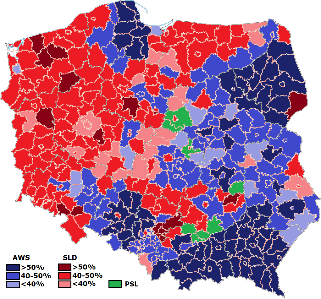 Źródło: Mariusz Kowalski „Geografia wyborcza Polski. Przestrzenne zróżnicowanie zachowań wyborczych Polaków w latach 1989-1998”, Warszawa 2000